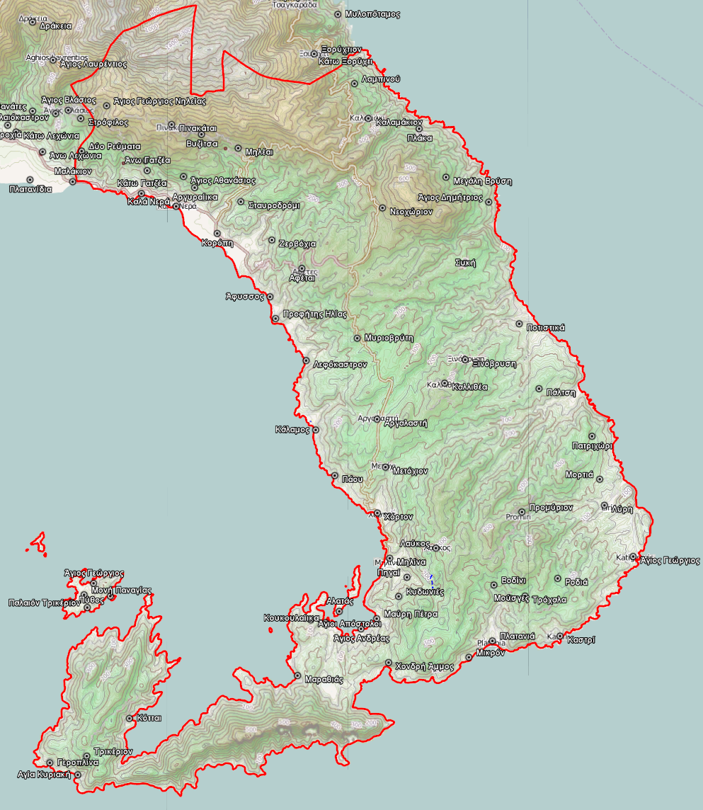 Τοπογραφικός χάρτης του Δήμου Νοτίου Πηλίου